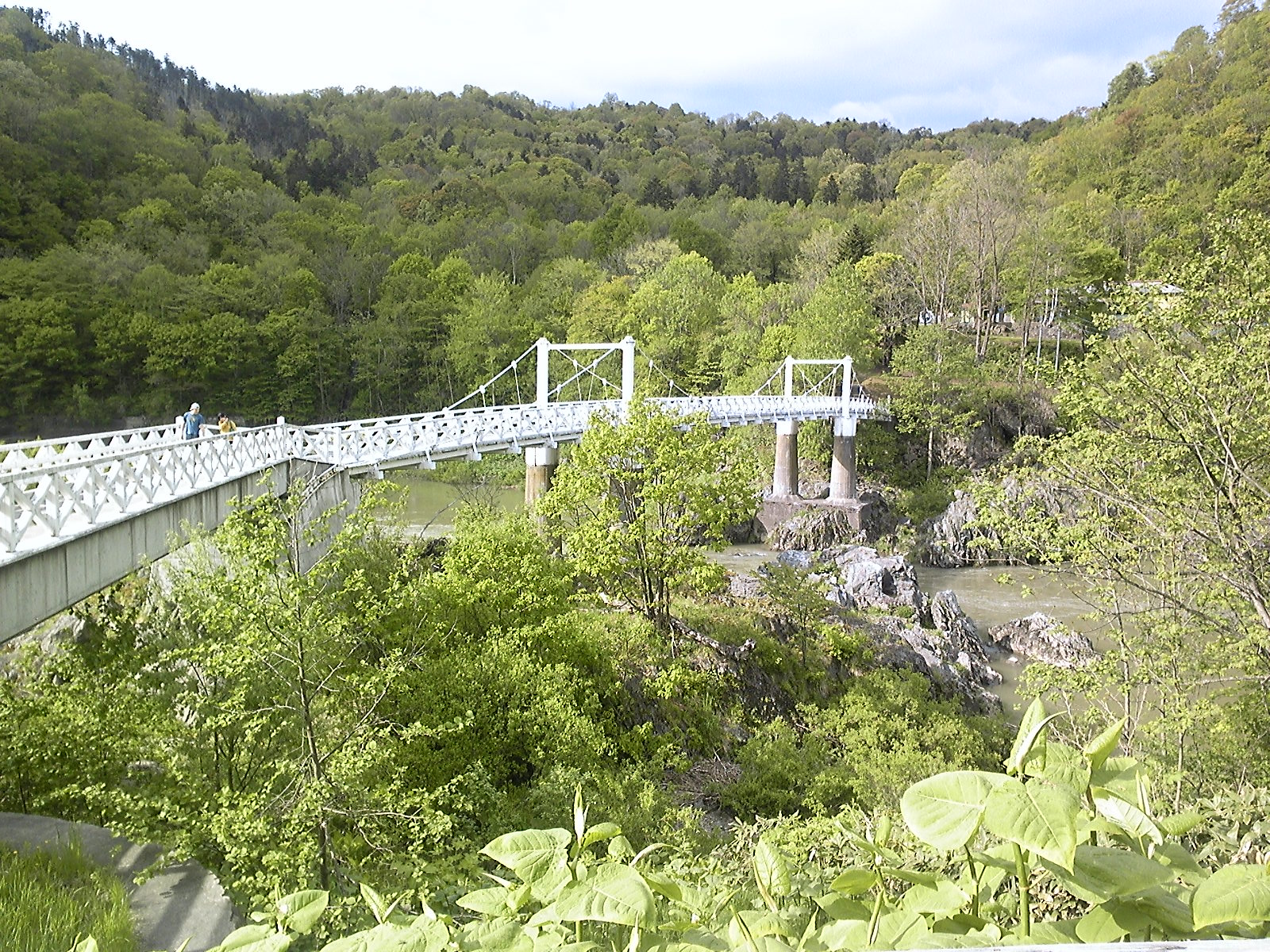 北海道旭川市神居古潭の石狩川に架かる神居大橋